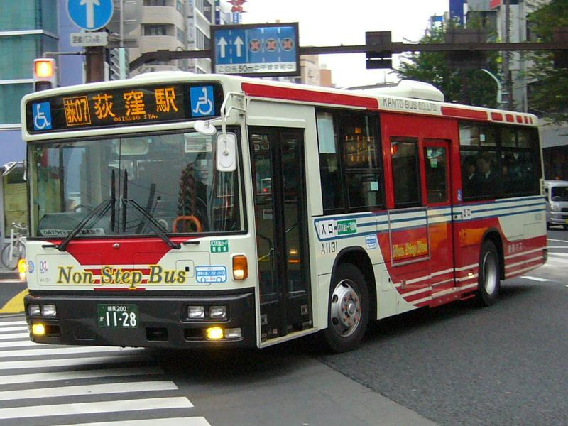 登録番号 練馬200か11-28 関東バス阿佐ヶ谷営業所所属 車番A1131 2005年10月27日 荻窪駅前にて撮影